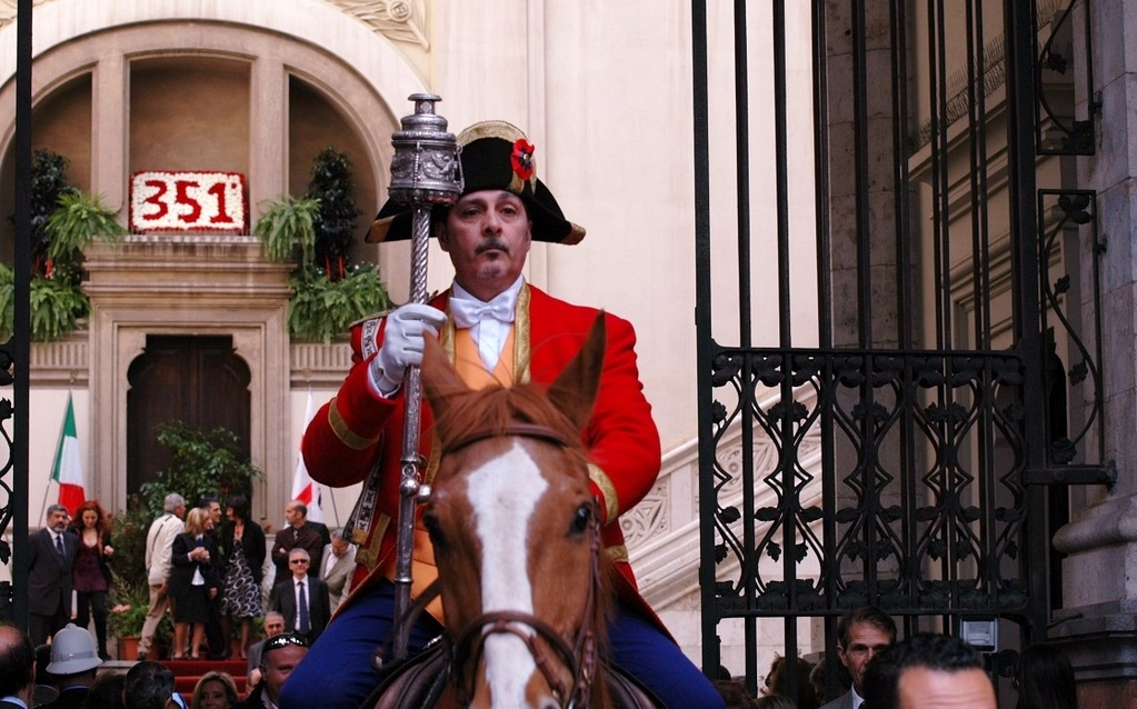 Mazziere del Comune di Cagliari